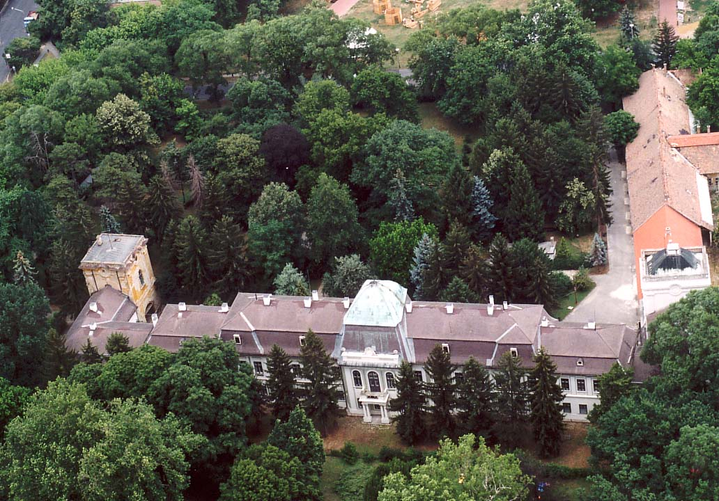 Volt Harruckern-Wenckheim-Almásy-kastély, barokk-copf, épült 1725 körül, bővítették 1745-ben és 1795-1798 között, 1801-ben leégett, 1802-1803 között Czigler Antal tervei szerint újjáépítették. azonosító: 2477 törzsszám: 727- Gyula, Kossuth Lajos u. 15